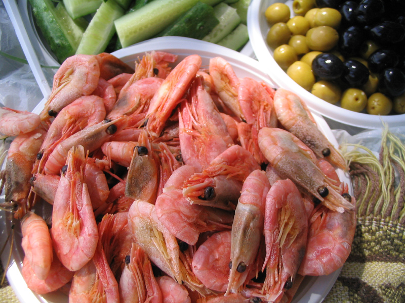 Креветки.